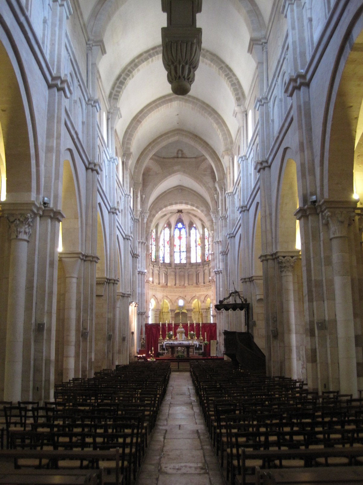 Collégiale Notre-Dame de Beaune